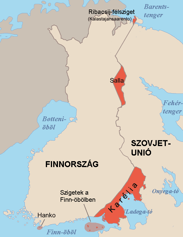 A kép a Téli háborút lezáró Moszkvai béke alapján Finnországtól a Szovjetuniónak átadott területeket mutatja